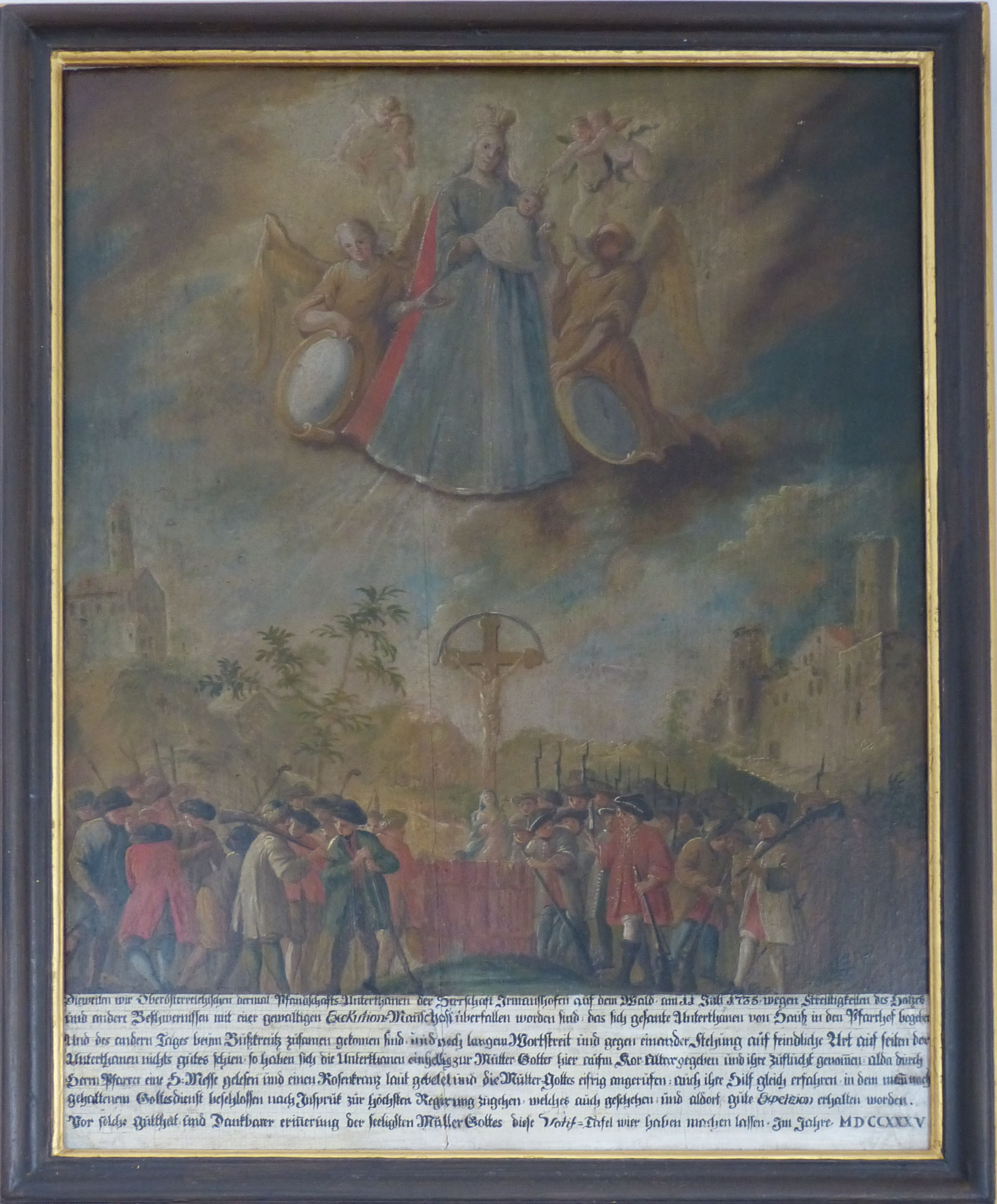 Votivbild von 1735 in der Kirche Mariä Himmelfahrt in Markt Wald (Landkreis Unterallgäu, Bayern)